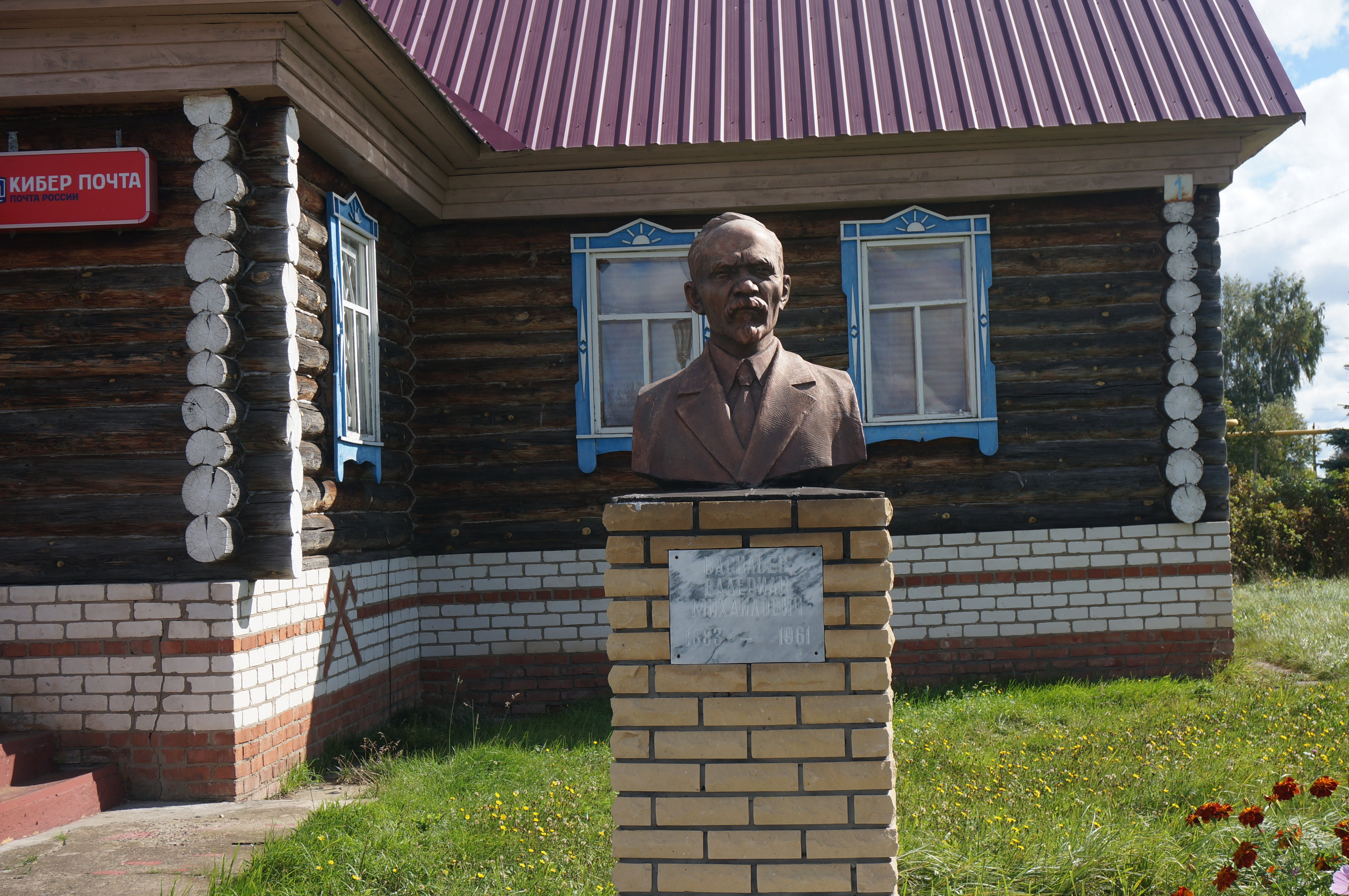 Деревня Сусады-Эбалак Янаульского района, Башкортостан. Памятник марийскому учёному-языковедау Васильеву Валериану Михайловичу.Башҡортса: Яңауыл районы Сусаҙы-Ябалаҡ ауылы. Валериан Васильев (1883-1961) — мари халҡының беренсе телсе-ғалимына һәйкәл.. Ансар Нуртдинов архивынан.